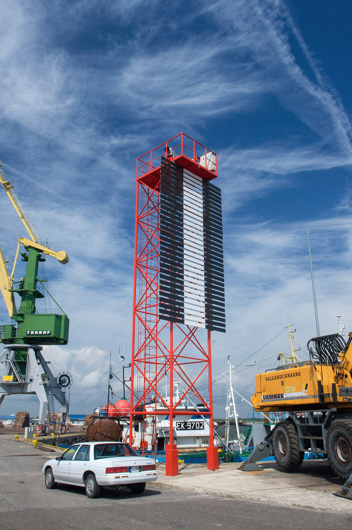 Roomassaare alumine tulepaak